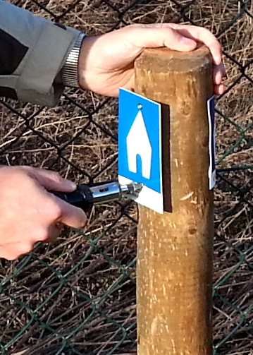 Mit diesen Wegweisern sind die Schönstatt-Pilgerwege ausgeschildert.